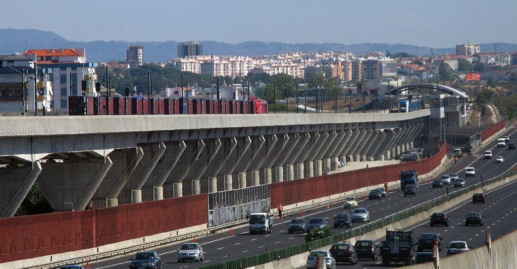 Cruzamento do comboio de transporte de Clinquer liderado pela Takargo 600?, cruzando com a 35?? da Fertagus para Roma-Areeiro perto da estação de Corroios (ao fundo) Agradecimentos ao Fábio pela edição de imagem!